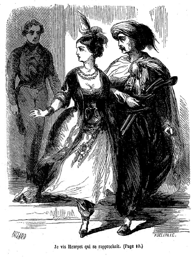 Illustration de Maurice Sand gravée par Delaville pour le roman "Leone Leoni", dans sa réédition incluse dans le volume 4 des "Oeuvres illustrées de George Sand", Paris, Hetzel, 1853.